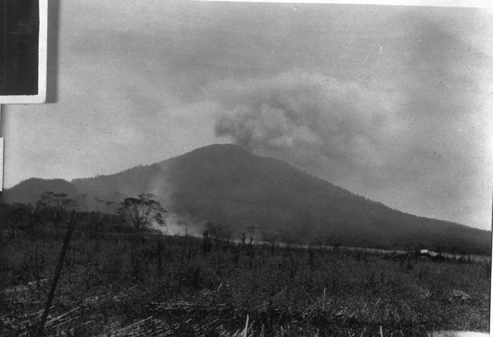 Foto. Gezicht op de Goenoeng Raoeng vanuit Kalibaroe op Oost-Java